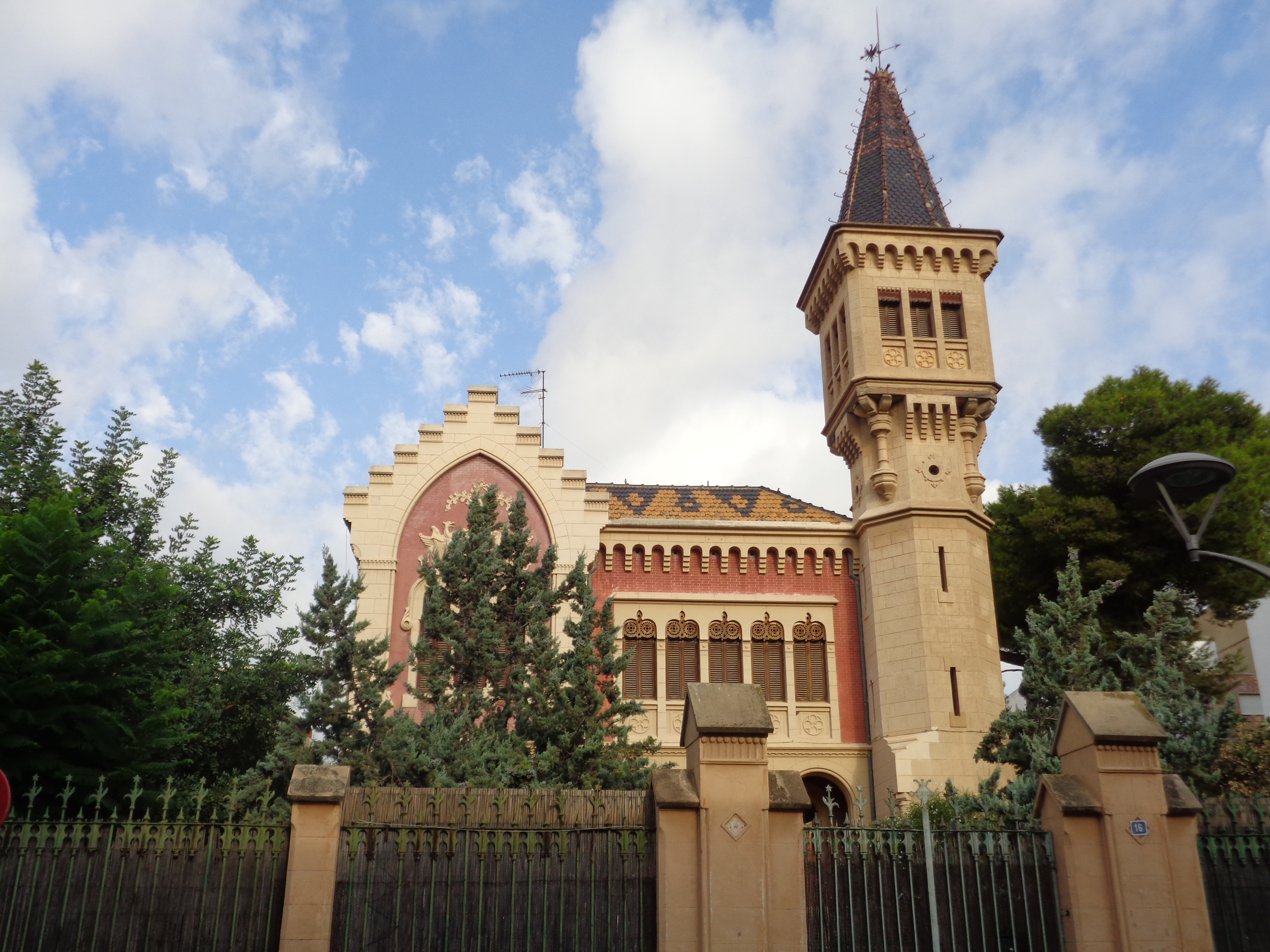 Xalet dissenyat per l'arquitecte Manuel Cortina.